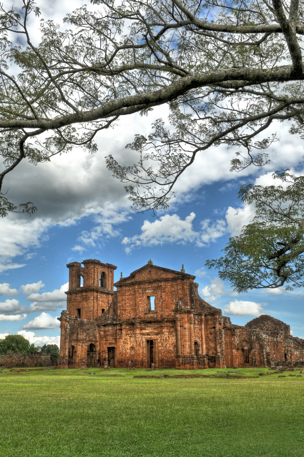 Sítio Arqueológico das Ruínas de São Miguel - Rio Grande do Sul - Brasil